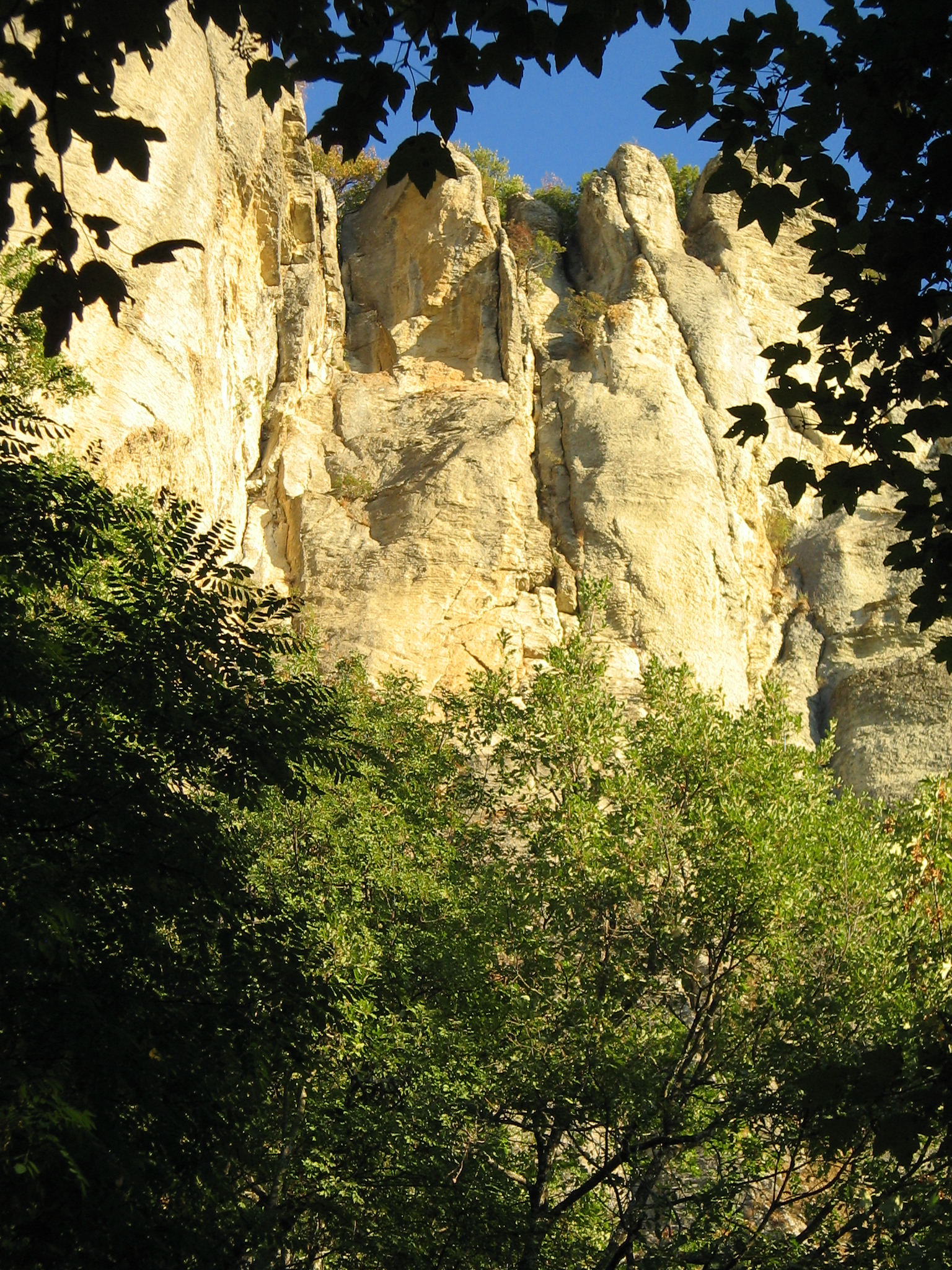 Via Ferrata Pietra di Bismantova - pareti di pietra, luogo di arrampicata di molti turisti